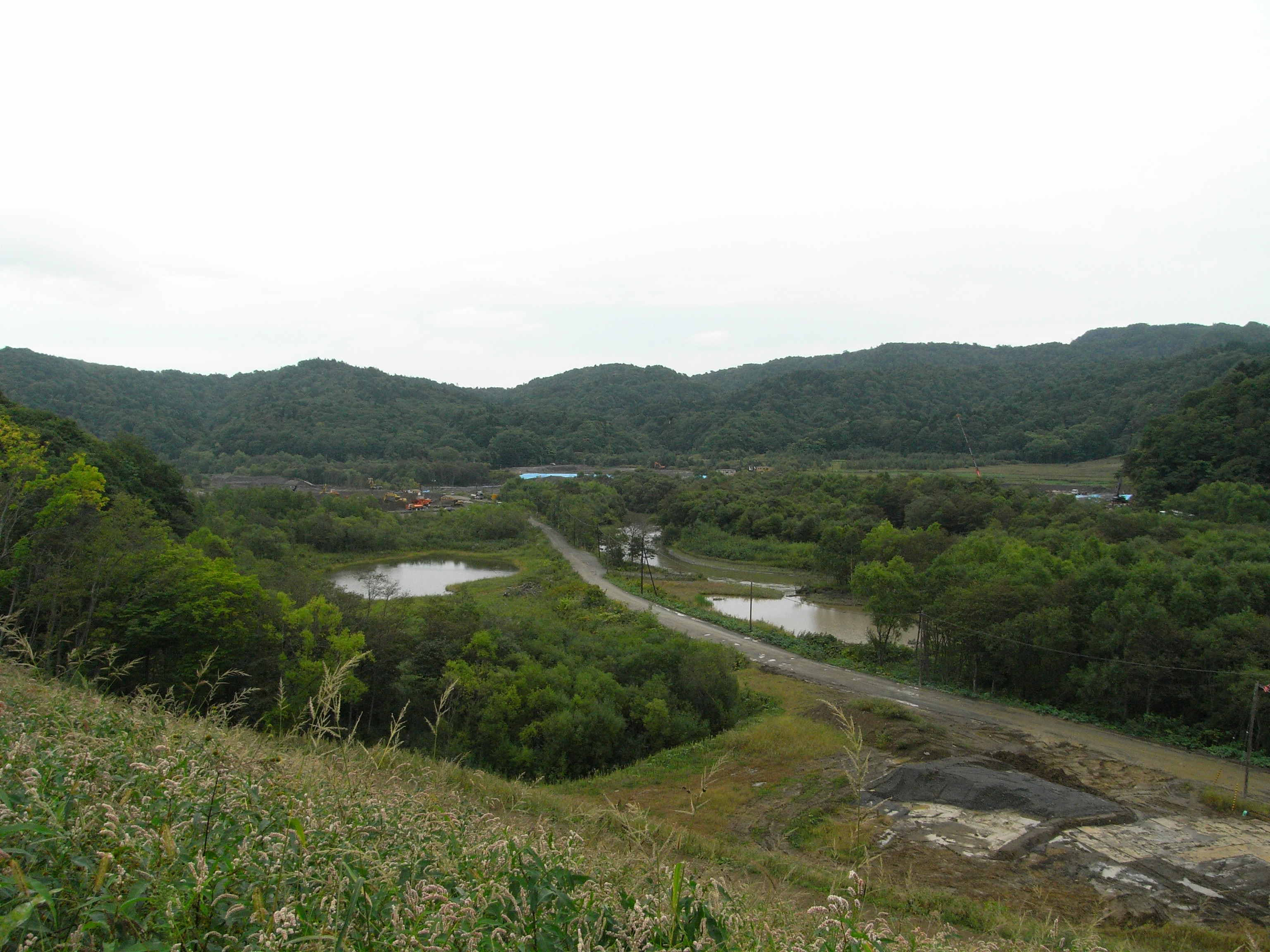 Dam